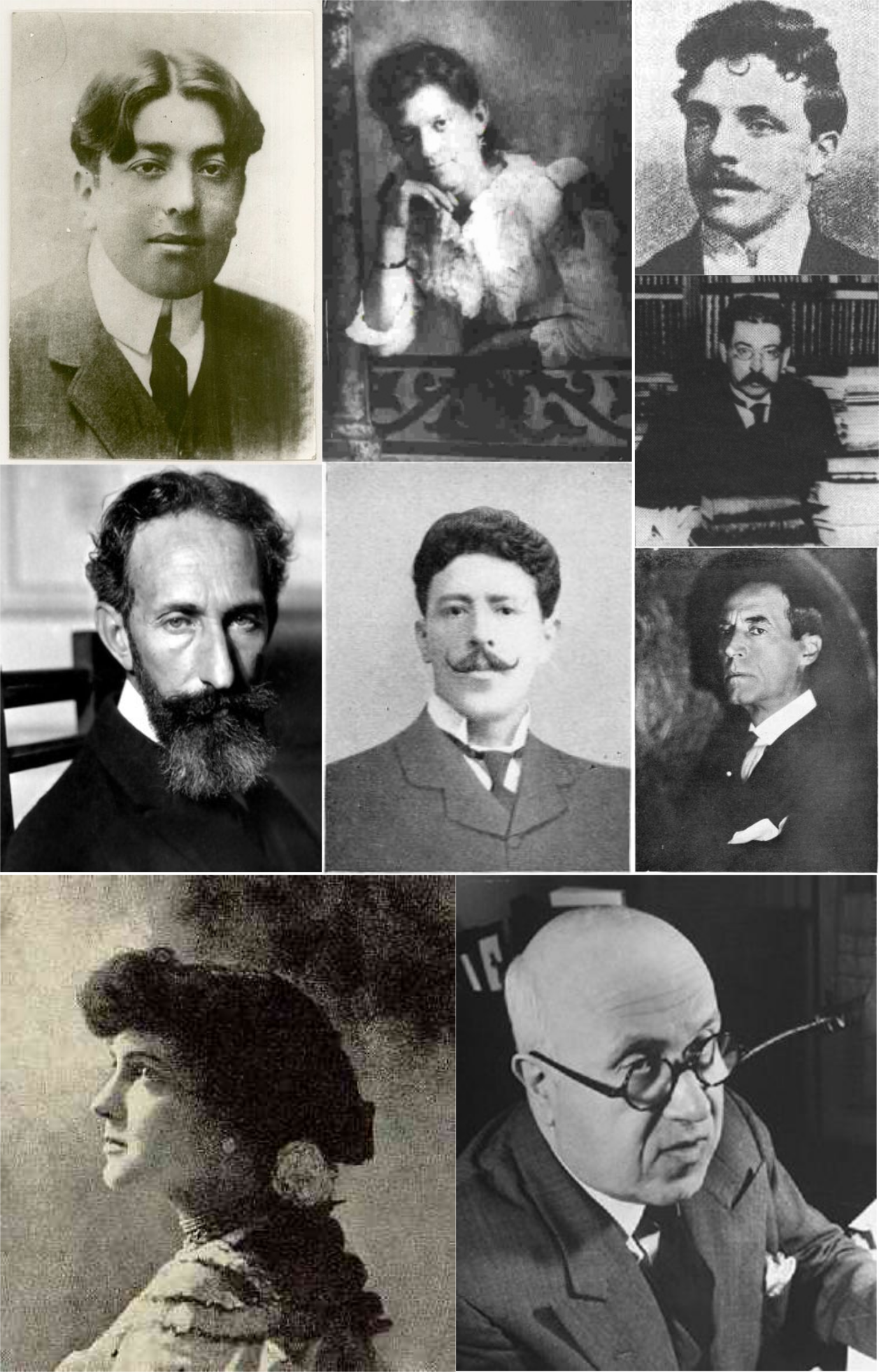 Fotocomposición de las imágenes de: José Enrique Rodó, Emilio Frugoni, Carlos Reyles, Javier de Viana, Delmira Agustini, María Eugenia Vaz Ferreira, Julio Herrera y Reissig, Horacio Quiroga y Florencio Sánchez. Todos integrantes de la generación del 900.